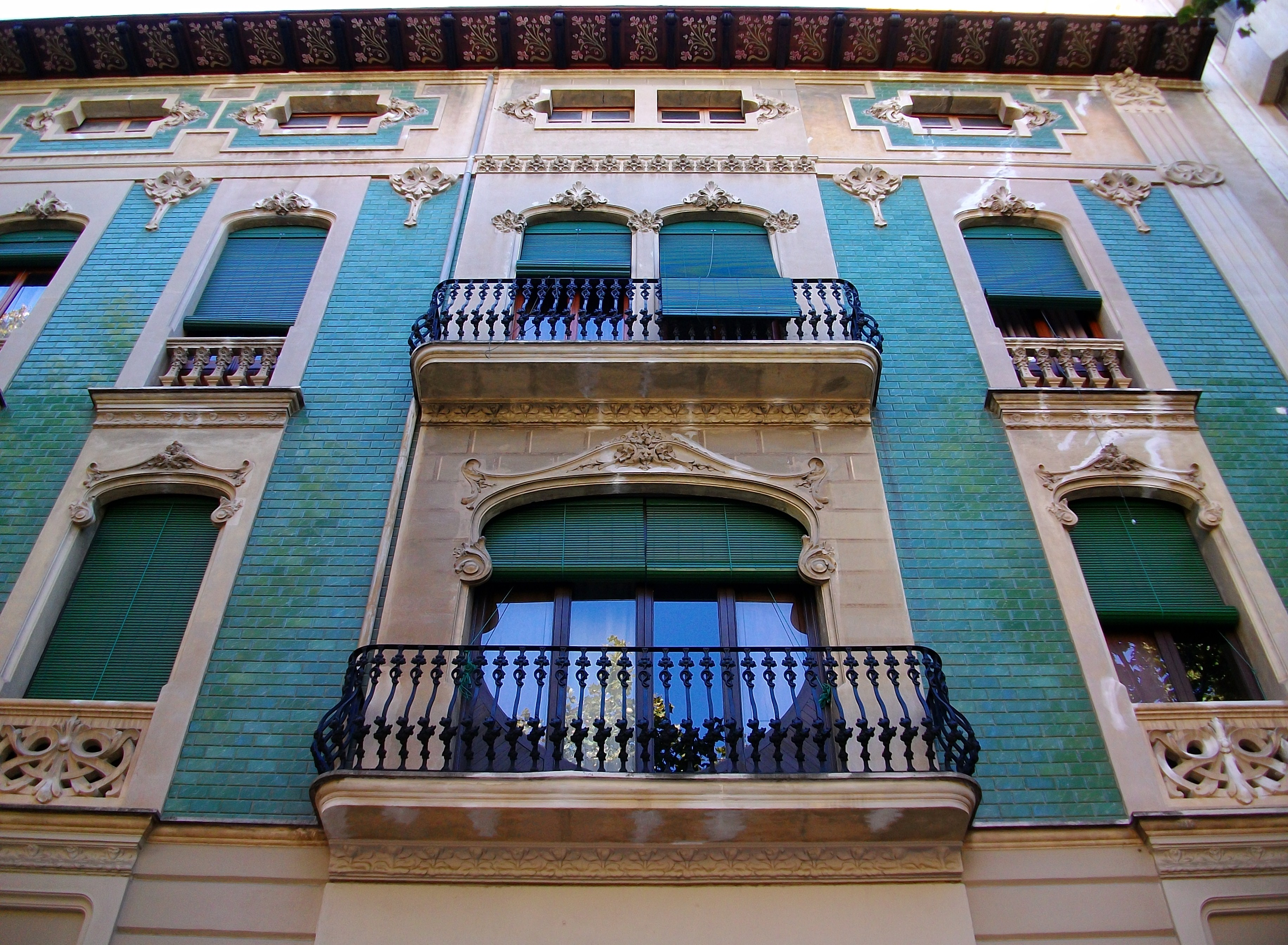 Xàtiva, edifici Botella.